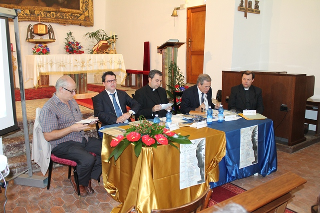 convegno costantiniano capri leone